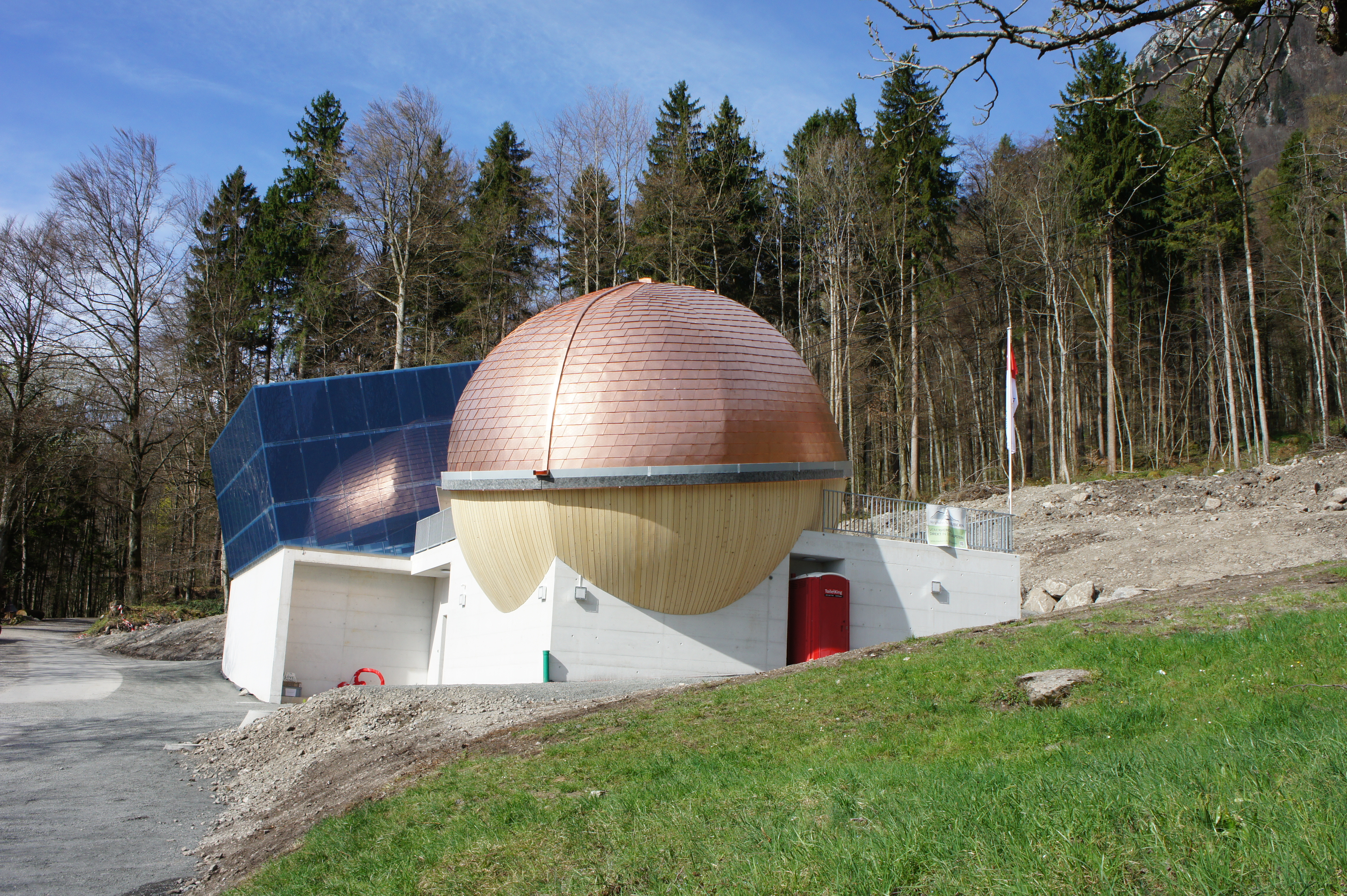 D Talstazion vo de Stauberebahn in ere Gsammtaasicht.